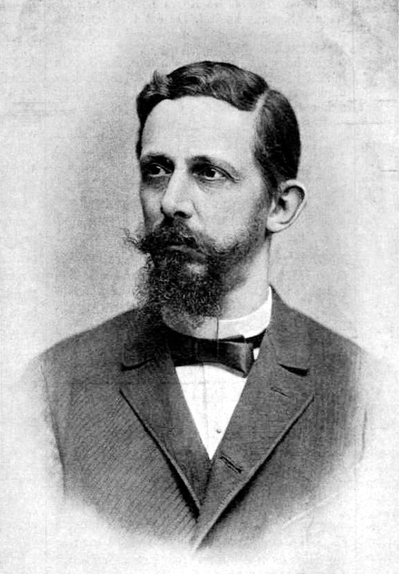 Pulszky Ágost (1846–1901) jogfilozófus, szociológus, egyetemi tanár, a Magyar Tudományos Akadémia levelező tagja portréja. Ellinger Ede fényképfelvétele